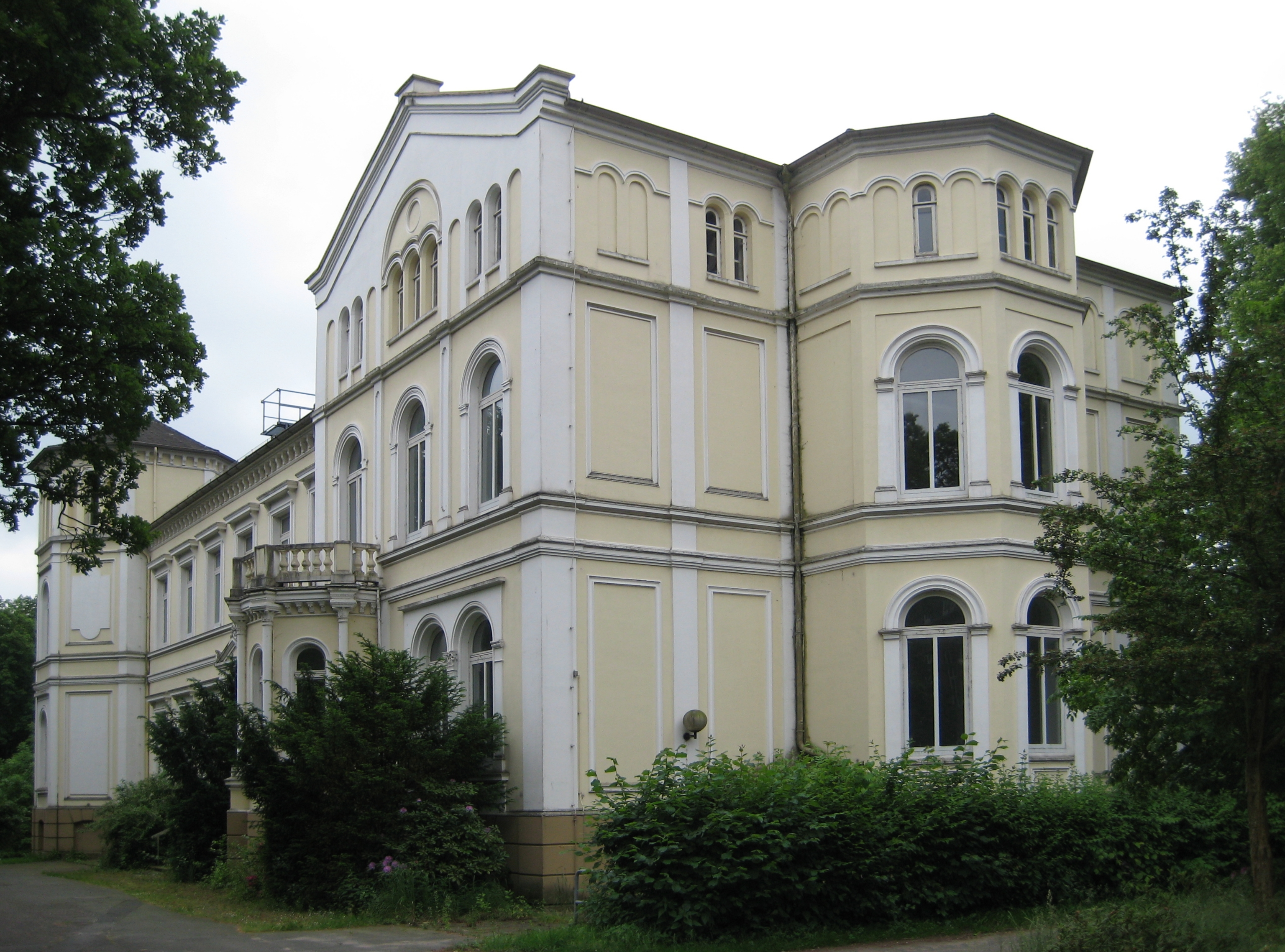 Landgericht Itzehoe, alter Westerhof